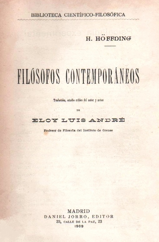 Filósofos contemporáneos, de Harald Høffding